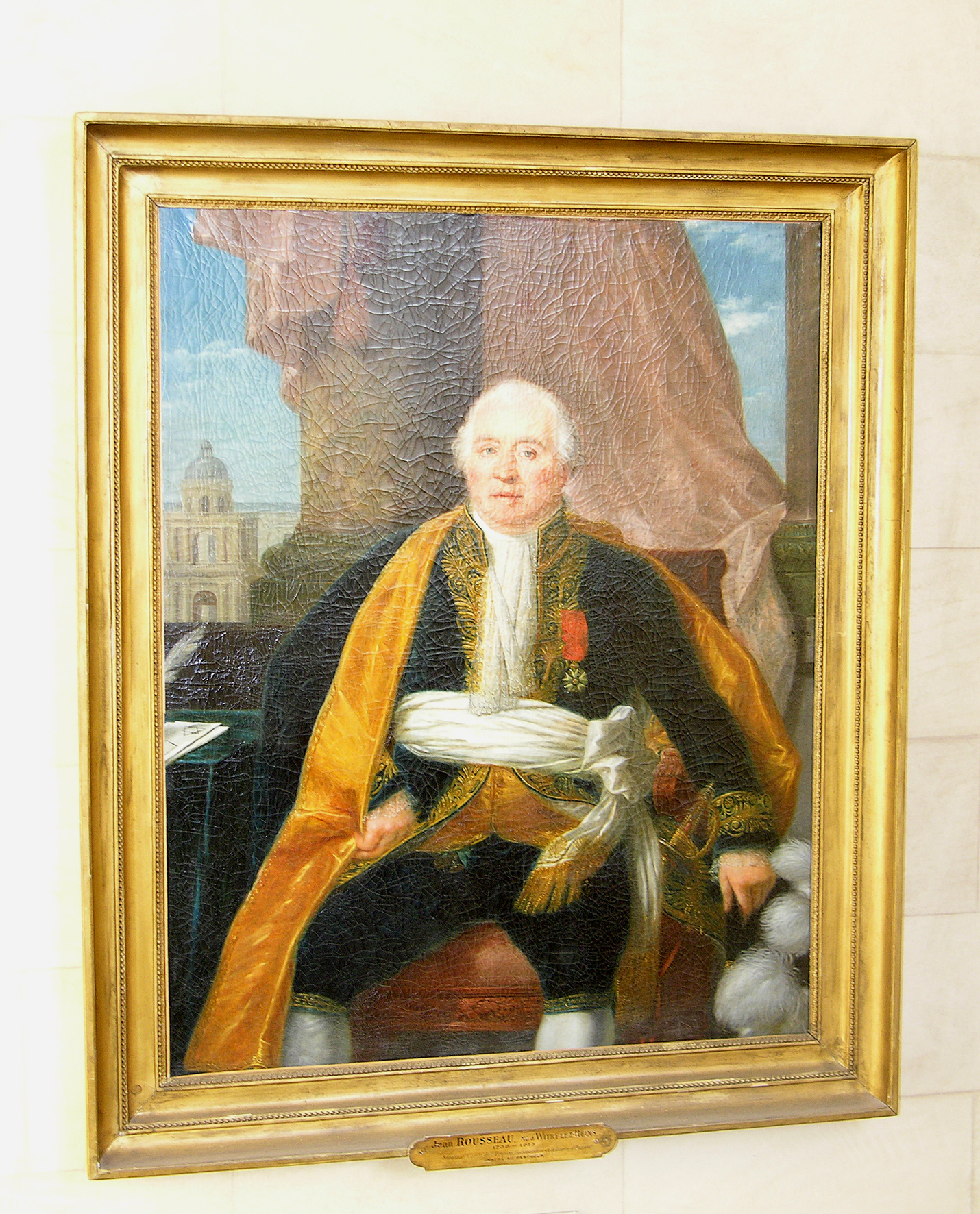 Portrait de Jean Rousseau (1738-1813), sénateur français.